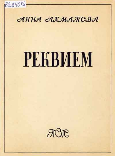 Обложка 1-го издания книги А. Ахматовой "Реквием" (Мюнхен: Т-во зарубежных писателей, 1963)